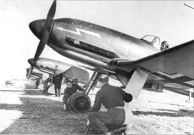 Не 100 из несуществующей эскадрильи Blitzgeschwader